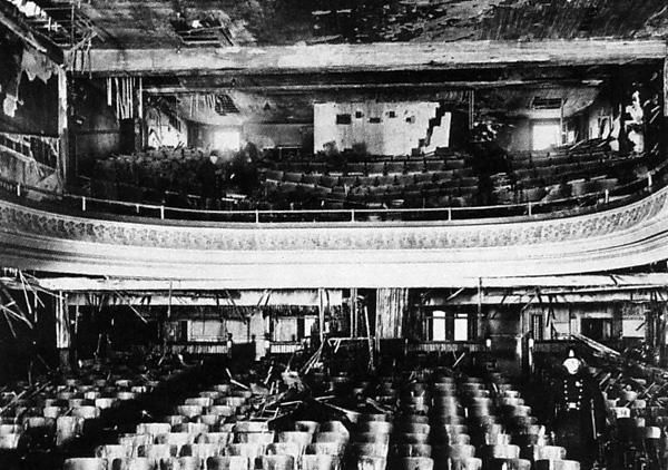 Le théâtre Laurier Palace après l'incendie du 9 janvier 1927.